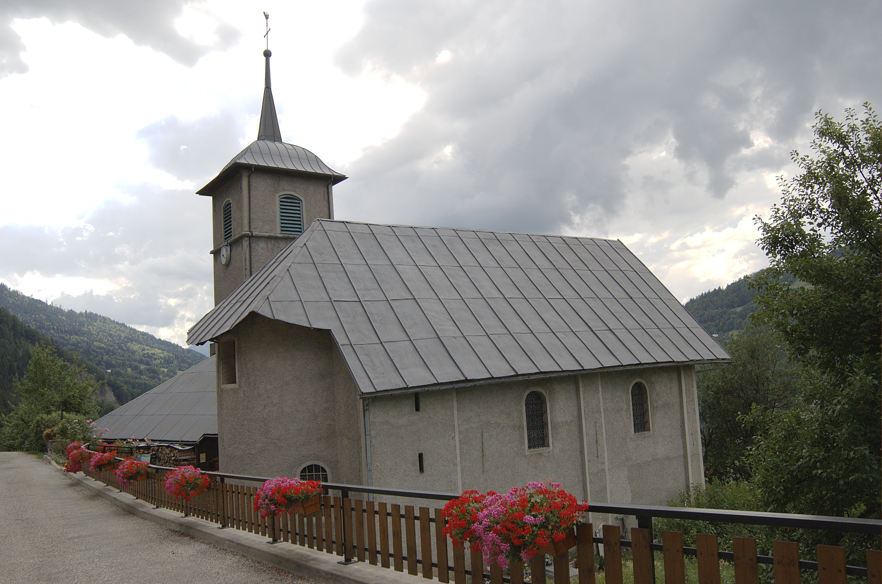 L'église du chef-lieu de Cohennoz